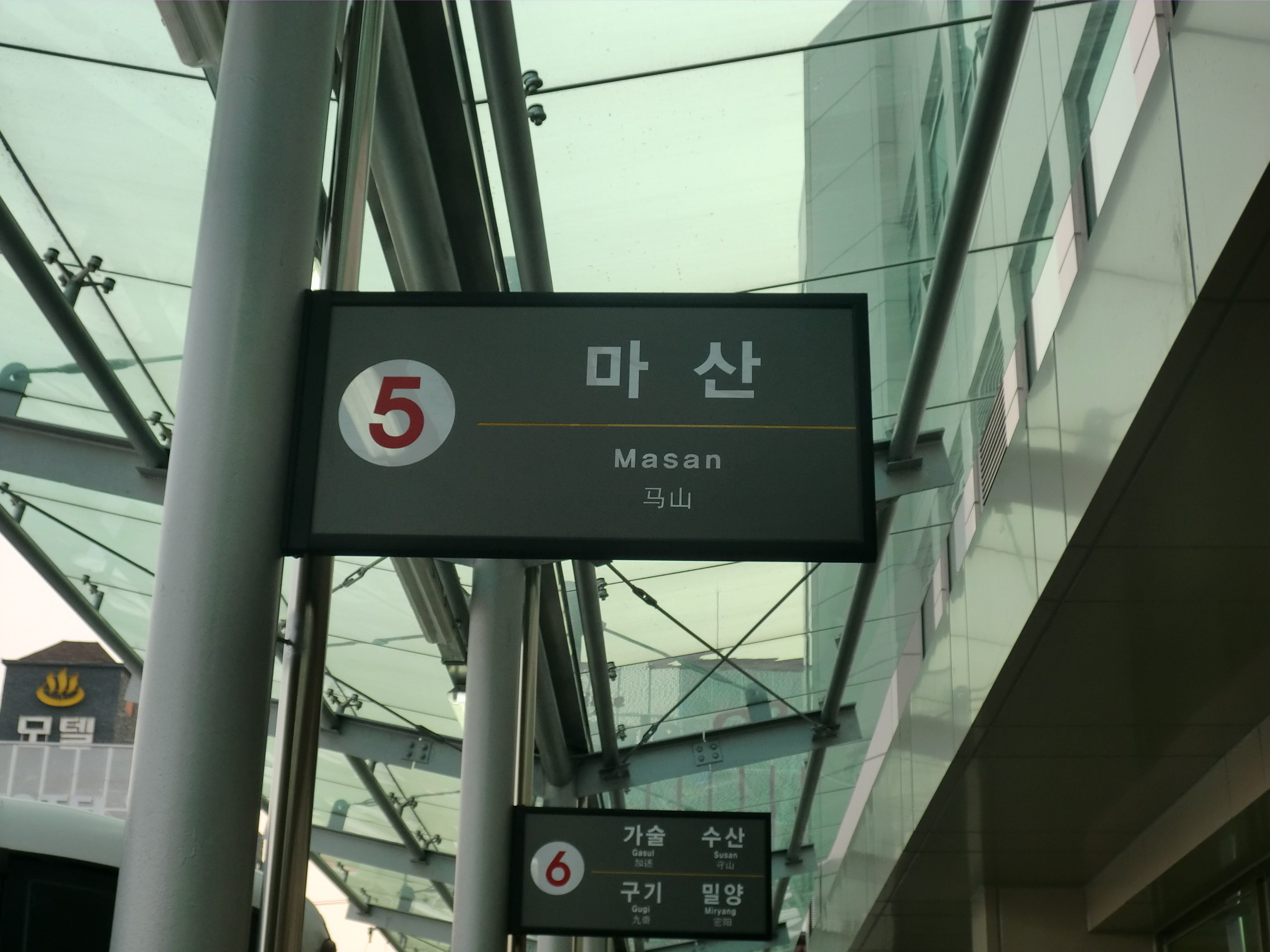 부산서부바스터미널 5번승차장